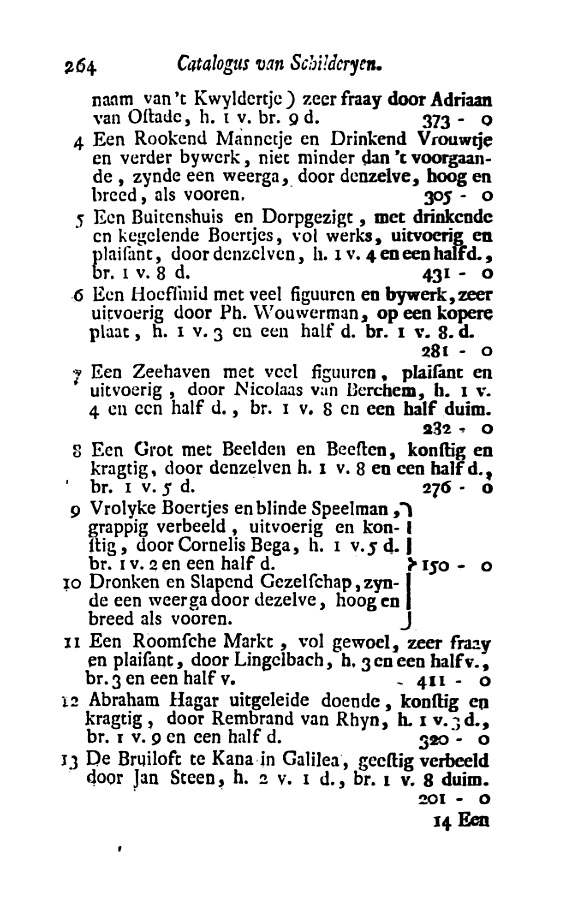 Gerard Hoet (1752) Catalogus of naamlyst van Schilderyen, 's Gravenhage: Pieter Gerard van Baalen, p. 264.